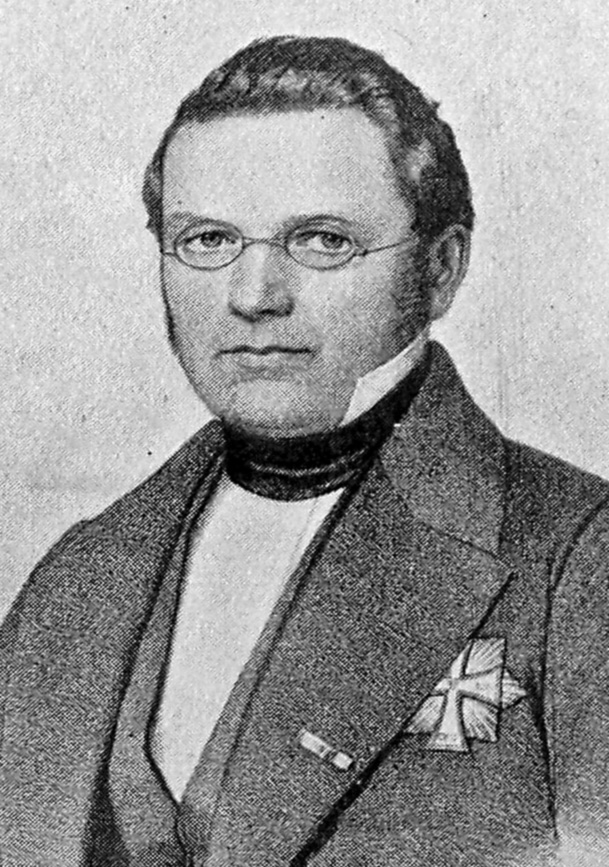 Frederik Ferdinand Tillisch (1801-89) var medlem af Folketinget fra 1851-1853 og igen fra 1858-1861. Medlem af Rigsrådet 1856-63. Minister for Slesvig 1850-1851 og indenrigsminister 1851-1852, 1854 og 1864-1865.